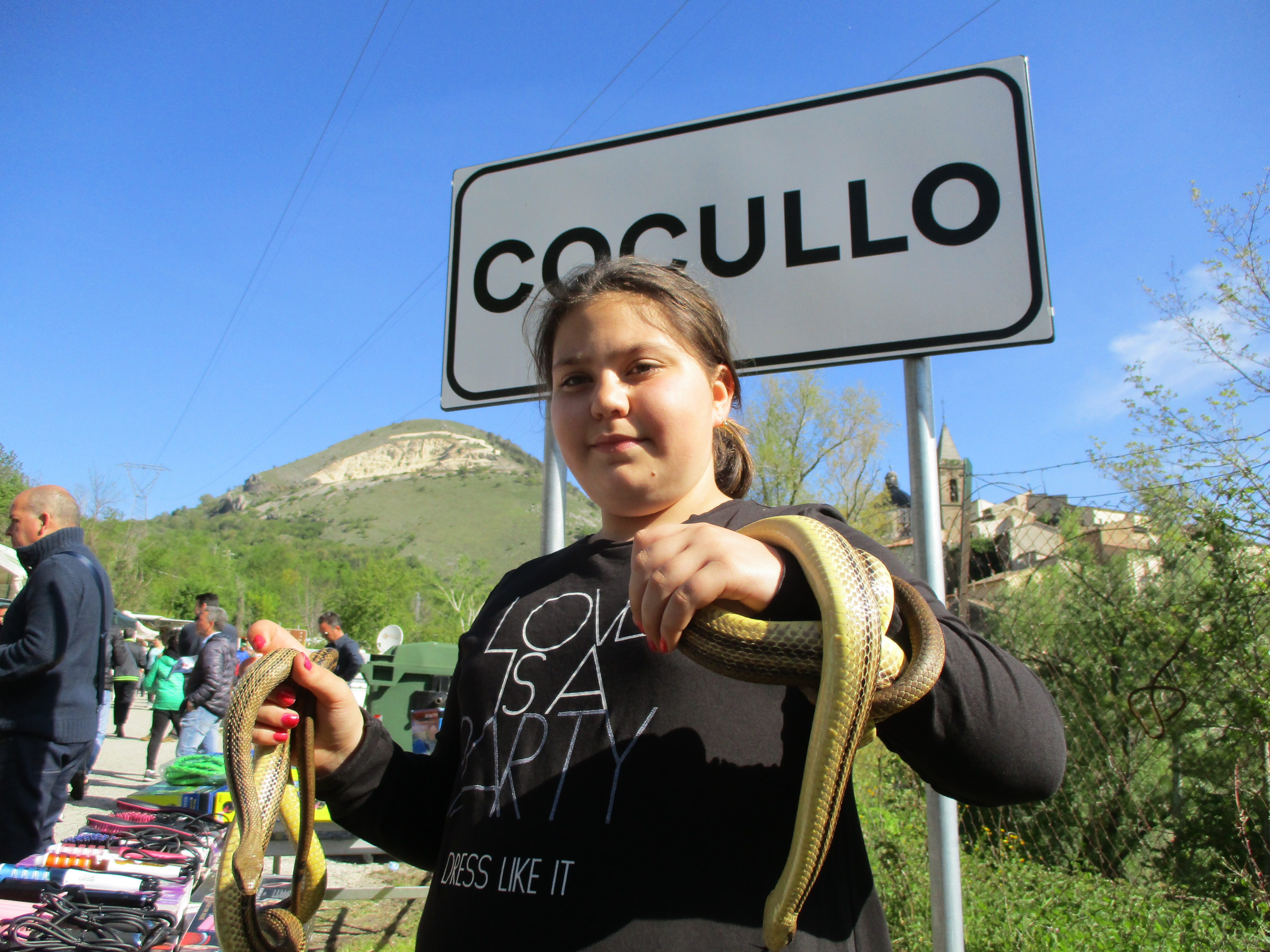 Ragazza mostra un serpente